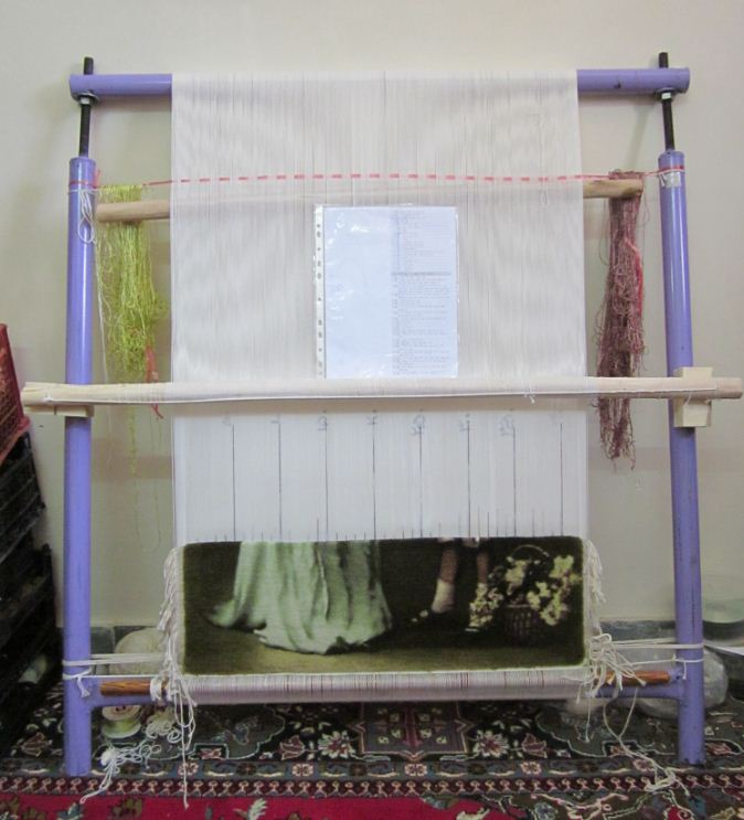 نمونه ی کوچک دار قالی که برای بافت تابلو فرش بکار می رود